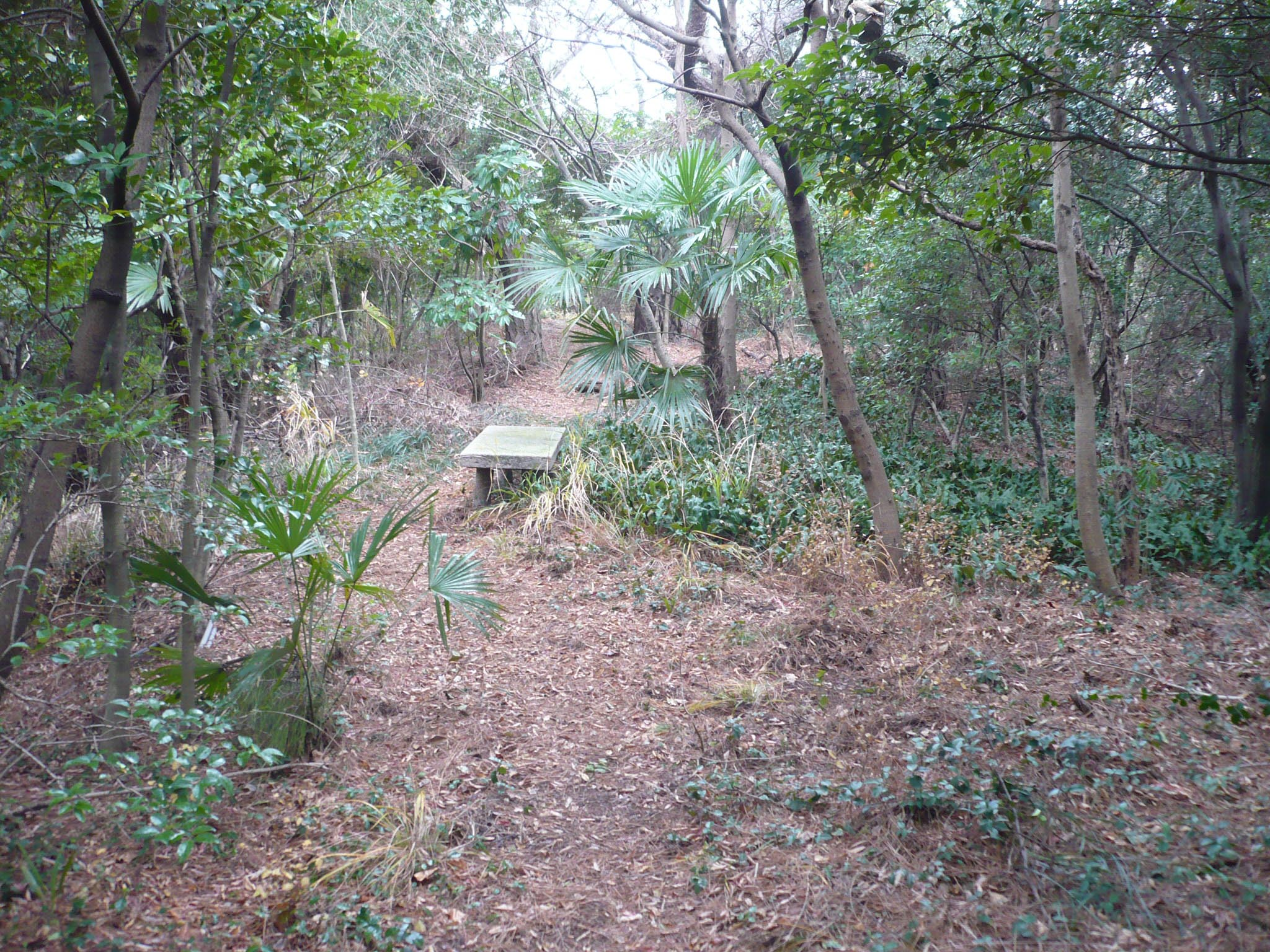 千畳敷曲輪跡